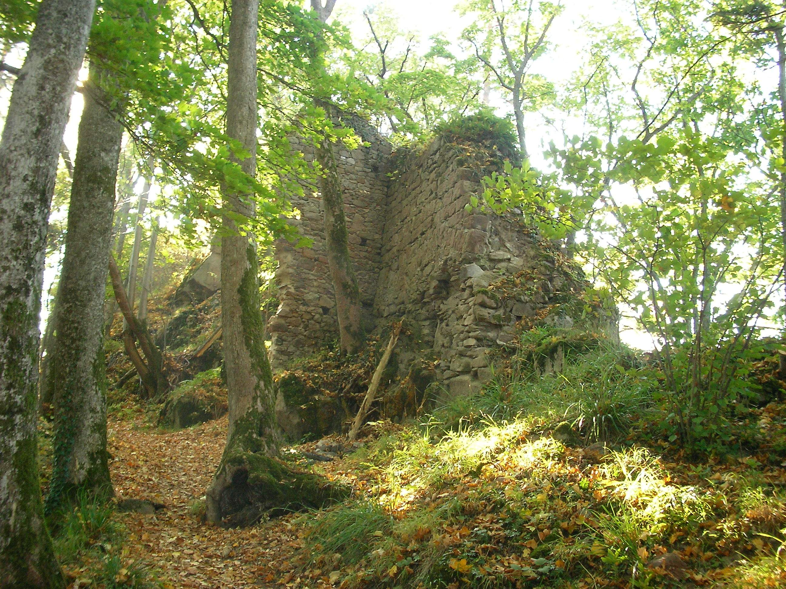 Château du Bilstein (757 m) à Riquewihr (Haut-Rhin, France).